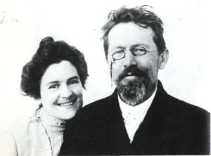 Ol'ga Knipper e Anton Cechov